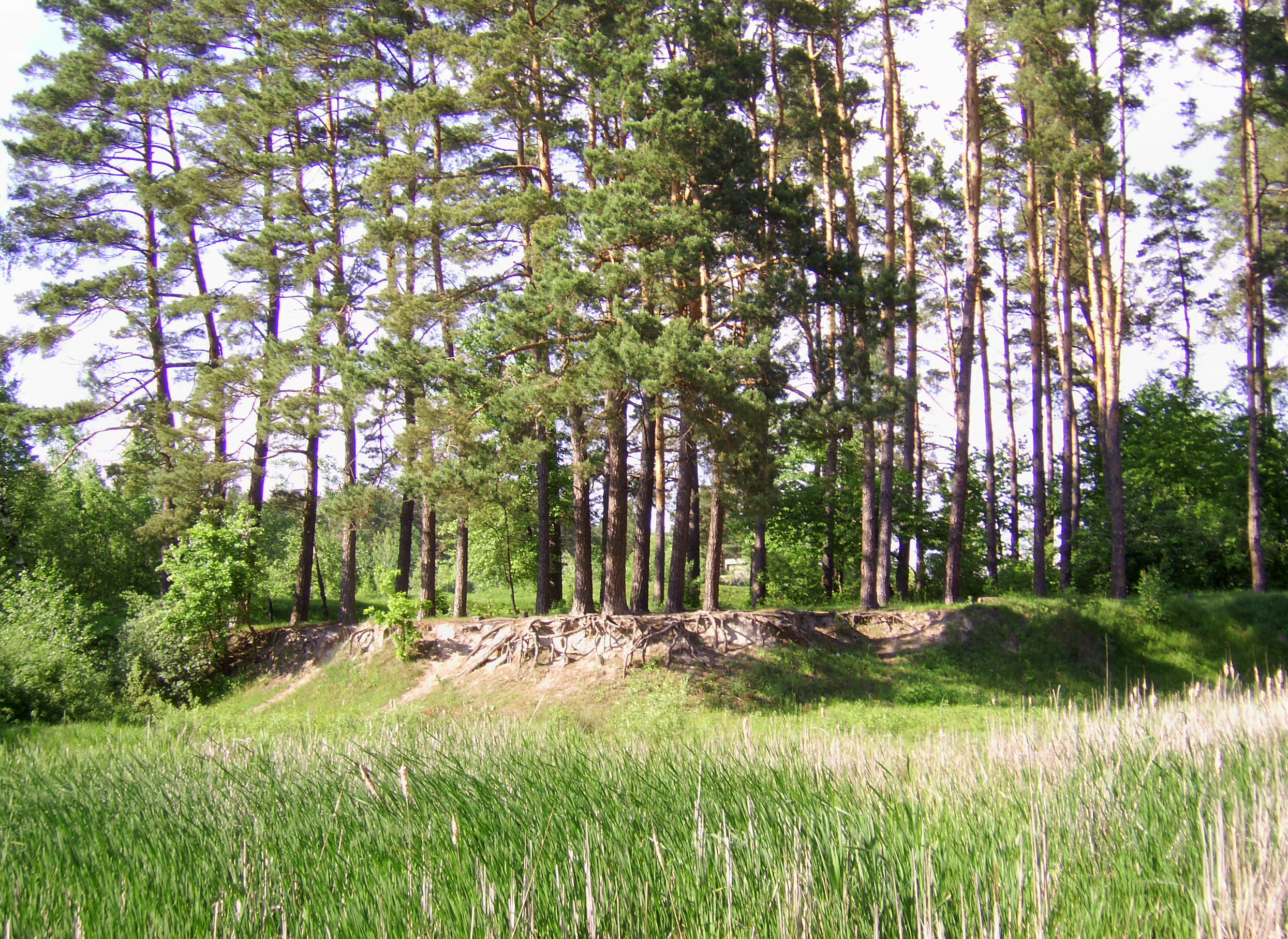 Вінницька область, Калинівський район с. Сальник Калинівське лісництво